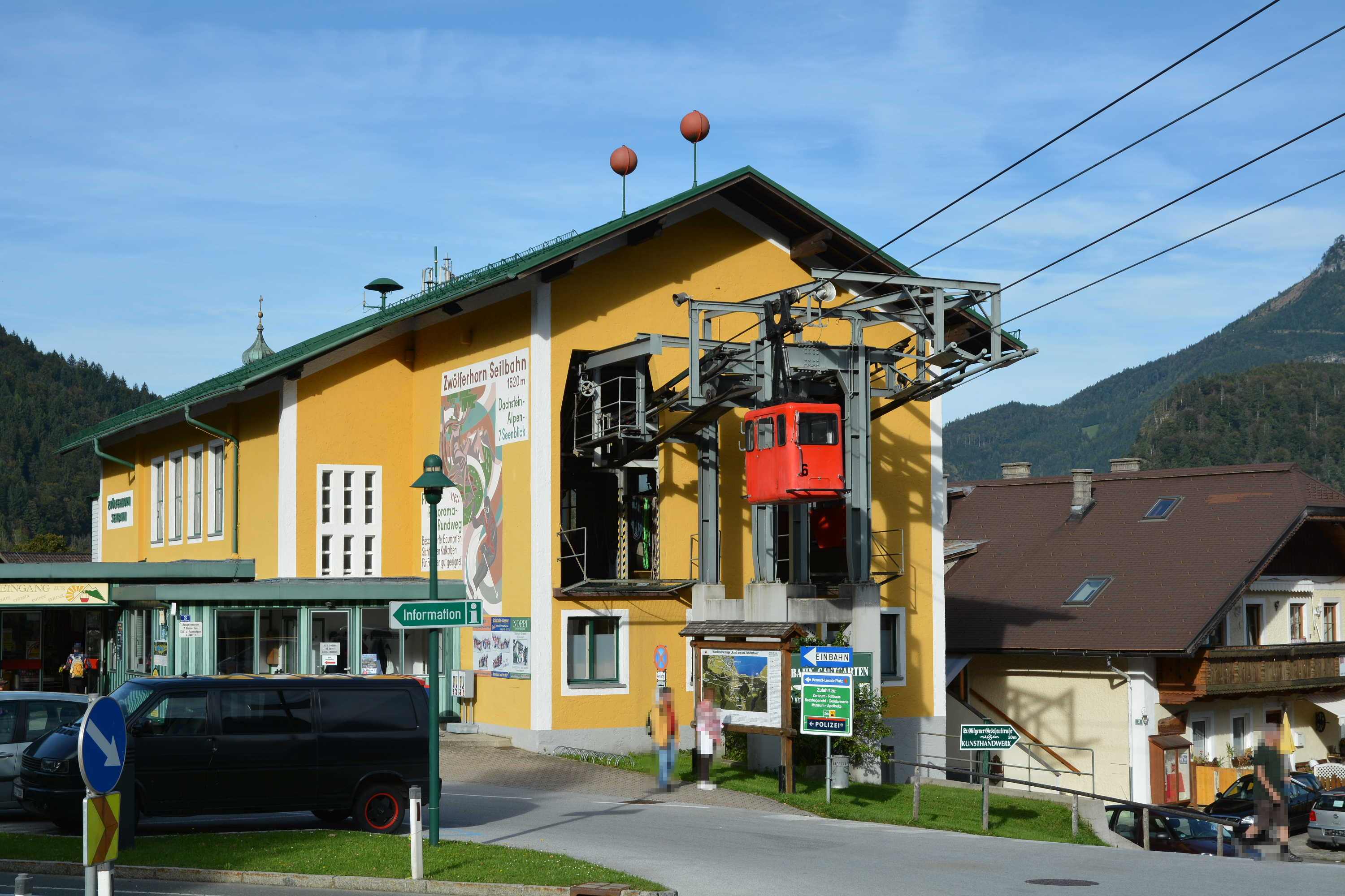 Talstation Zwölferhornseilbahn St. Gilgen, Austria